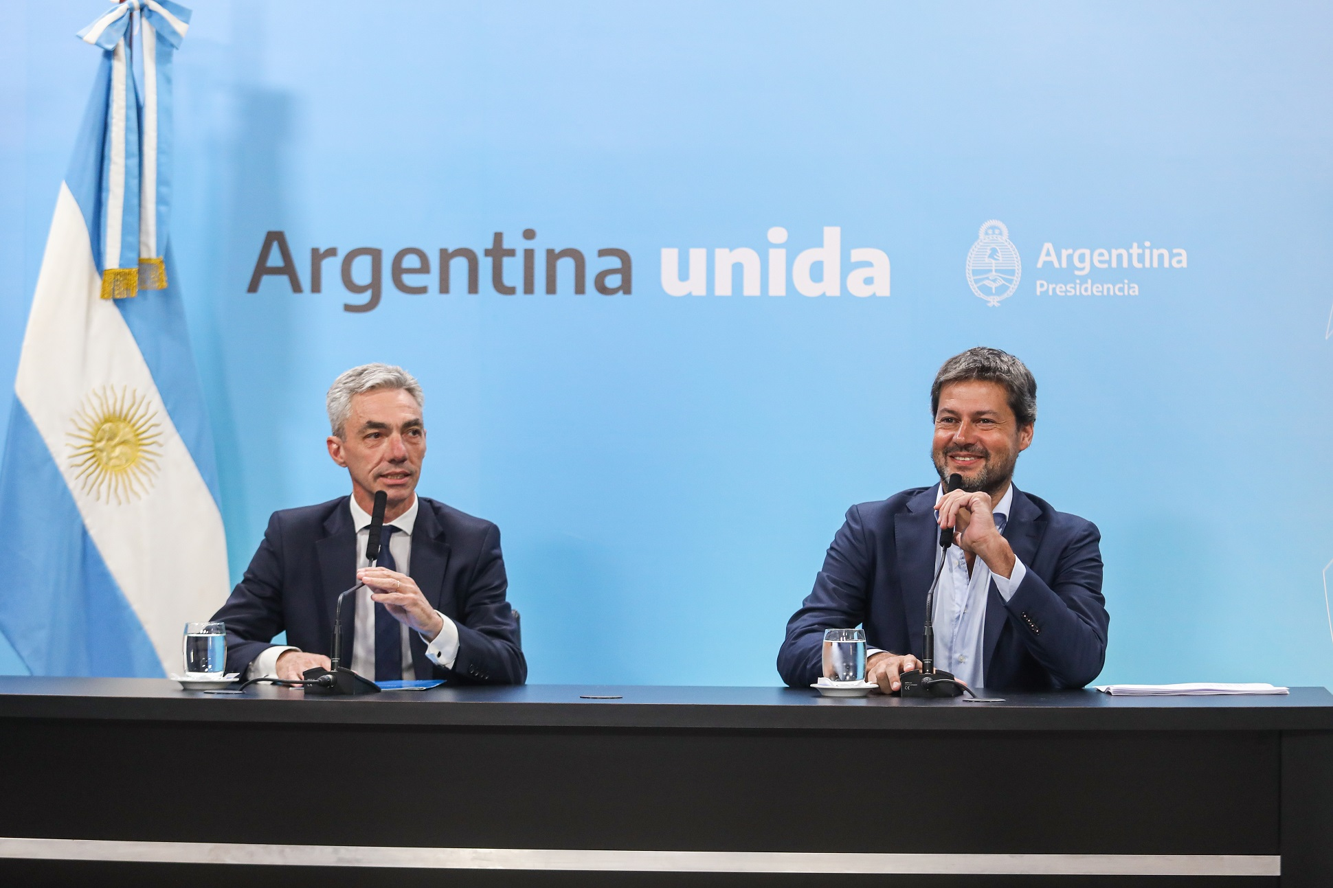 El Gobierno nacional, a través de la Administración Nacional de Aviación Civil (ANAC), estableció que los vuelos regionales vuelvan a operar en el Aeroparque Internacional Jorge Newbery desde el 11 de mayo próximo, en una medida que busca fomentar el turismo receptivo. La decisión fue anunciada por los ministros de Transporte, Mario Meoni, y de Turismo y Deportes, Matías Lammens, en una conferencia de prensa que brindaron esta tarde en la Casa Rosada.